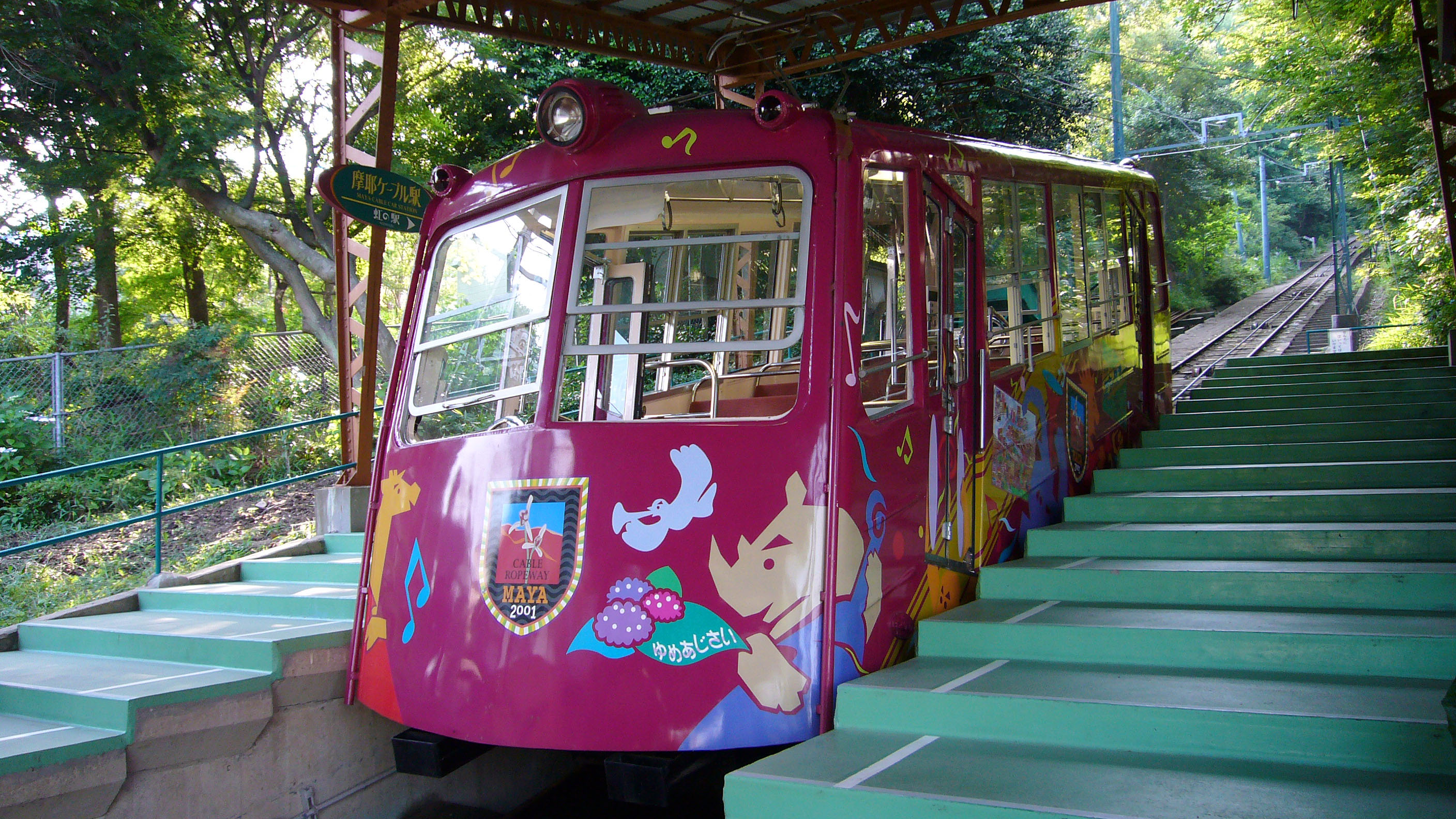 Maya Cablecar in Kobe, Japan